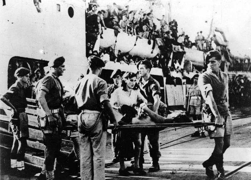 Haifa, Einwandererschiff "Jewish State" Der Strom der jüdischen Flüchtlinge nach Palästina reißt nicht ab. Immer wieder versuchen jüdische Flüchtlinge auf gecharteten Schiffen illegal nach Palästina einzuwandern, und immer wieder werden sie mit ihren Schiffen vor der Küste von britischen Kriegsschiffen aufgebracht. Die Transporte werden nach der Aufbringung nach Cypern weitergeleitet, nur Kranke werden in Palästina gelandet. Unser Bild zeigt das Einwandererschiff "Jewish State" in Haifa, wo kranke jüdische Einwanderer von Bord gebracht werden bevor das Schiff nach Cypern weitergeleitet wird. 8-10-47 R/3982/II/IC זרם של פליטים יהודים הגיעו לפלסטינה ללא הפסק. שוב ושוב, מנסים פליטים יהודים בלתי חוקיים לעלות, ושוב הם מגיעים עם ספינות המעפילים שלהם מול חופי ספינות מלחמה בריטית. המעפילים שנתפסו נשלחו לקפריסין. התמונה מראה את האונייה "מדינת היהודים" בנמל חיפה, ממנה מורדים נישאים על אלונקה מעפילים חולים, לפני שהספינה הועברה לקפריסין